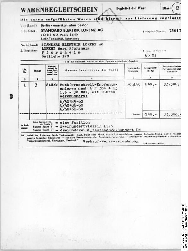 Zentralbild Repro 3.11.1960 Kriegsmaterial beschlagnahmt Von den Kontrollorgangen der Deutschen Demokratischen Republik wurde am Grenzkontrollamt Drewitz die Lastzüge KA-CJ 280 und KA-AC 281, die Waren der Firma Standard Elektronik Lorenz AG, Lorenz-Werke Berlin-Tempelhof nach Westdeutschland transportieren sollten, wegen widersprüchlicher Angaben in den Transportpapieren bzw. wegen Verdachts, daß es sich um Geräte für militärische Zwecke handelt, vorläufig ausgesetzt. UBz: Ausschnitte aus einem der Warenbegleitscheine.